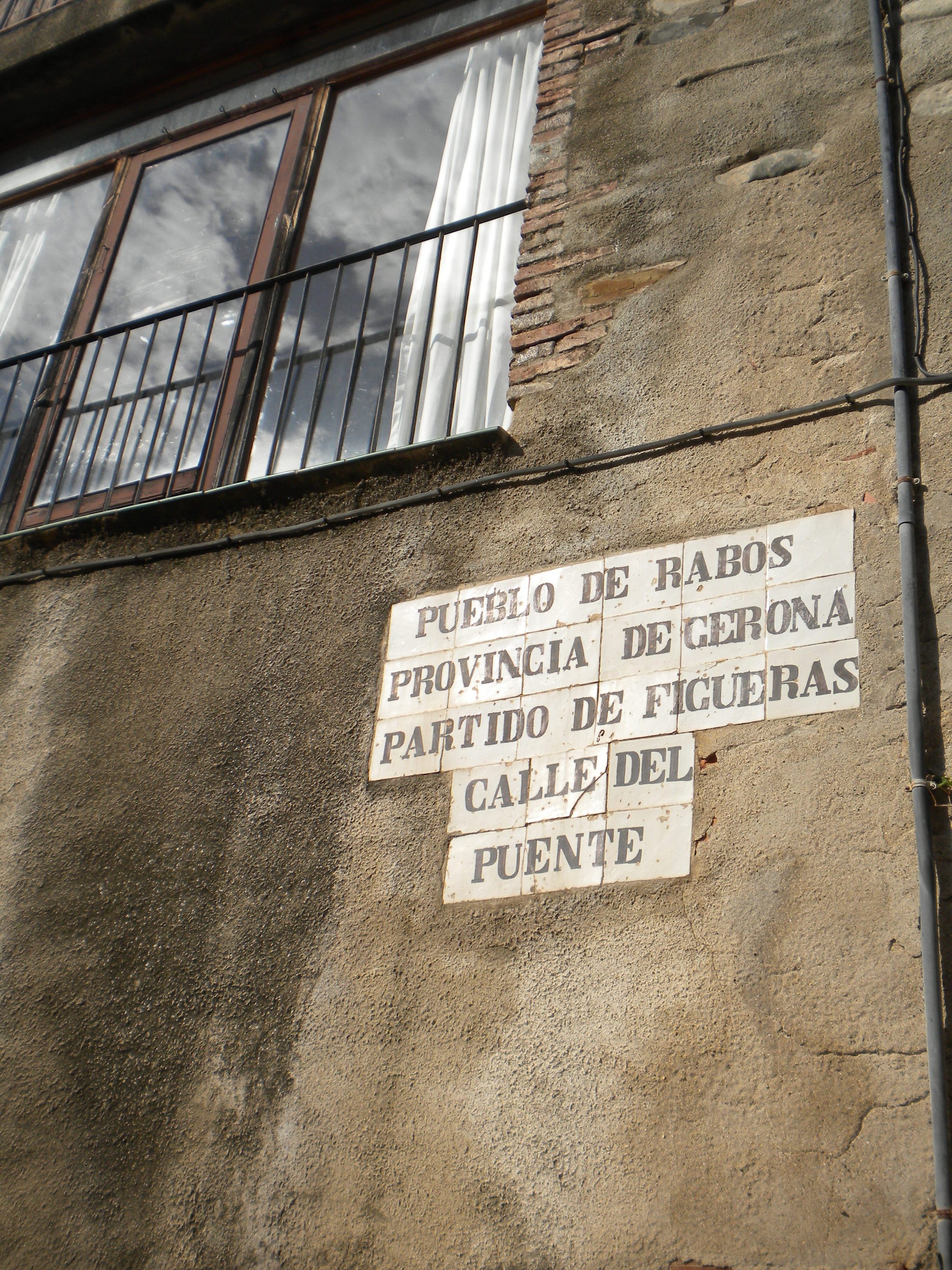 Rètol al carrer del Pont de Rabós.